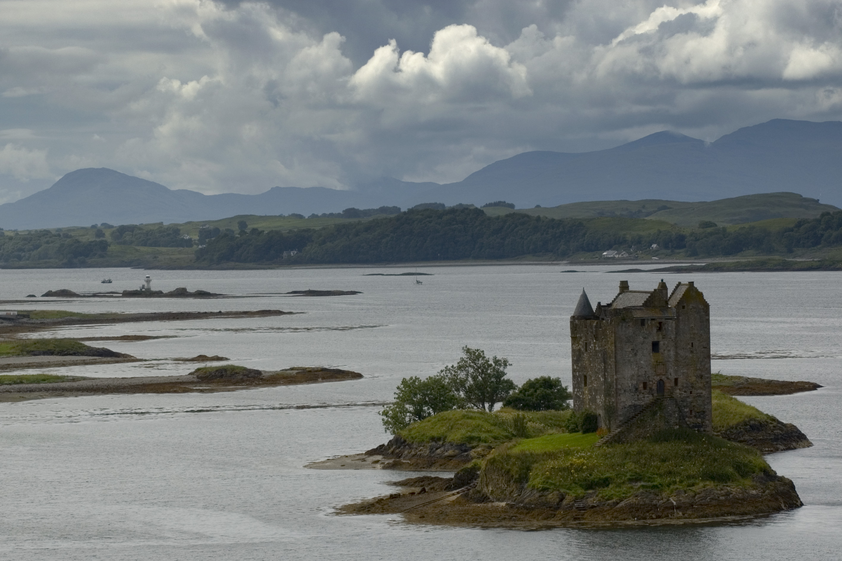 Castle Stalker, Loch Laich, an inlet off Loch Linnhe, Scotland.